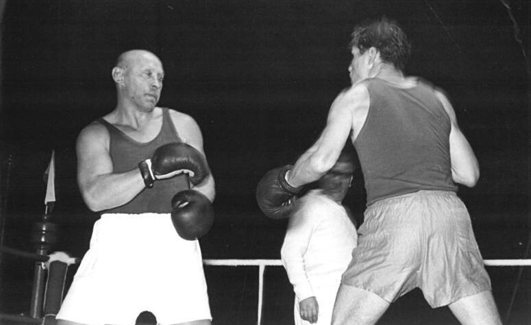 Kereljew, Rademacher Zentralbild III 15 Motive 2.10.1954 Internationales Boxturnier im Wassil-Lewski-Stadion in Sofia im September 1954 (Bulgarien) Das grosse internationale Länderturnier im Boxen wurde am 22. September abgeschlossen. Die polnische Staffel belegte mit 10:0 Punkten den ersten Platz. An zweiter Stelle steht die Sowjetunion, gefolgt von Bulgarien, Ungarn, der Tschechoslowakische Republik und der Mannschaft der Deutschen Demokratischen Republik. UBz: Boxkampf zwischen Kereljew (UdSSR) und Rademacher (CSR), Schwergewicht.